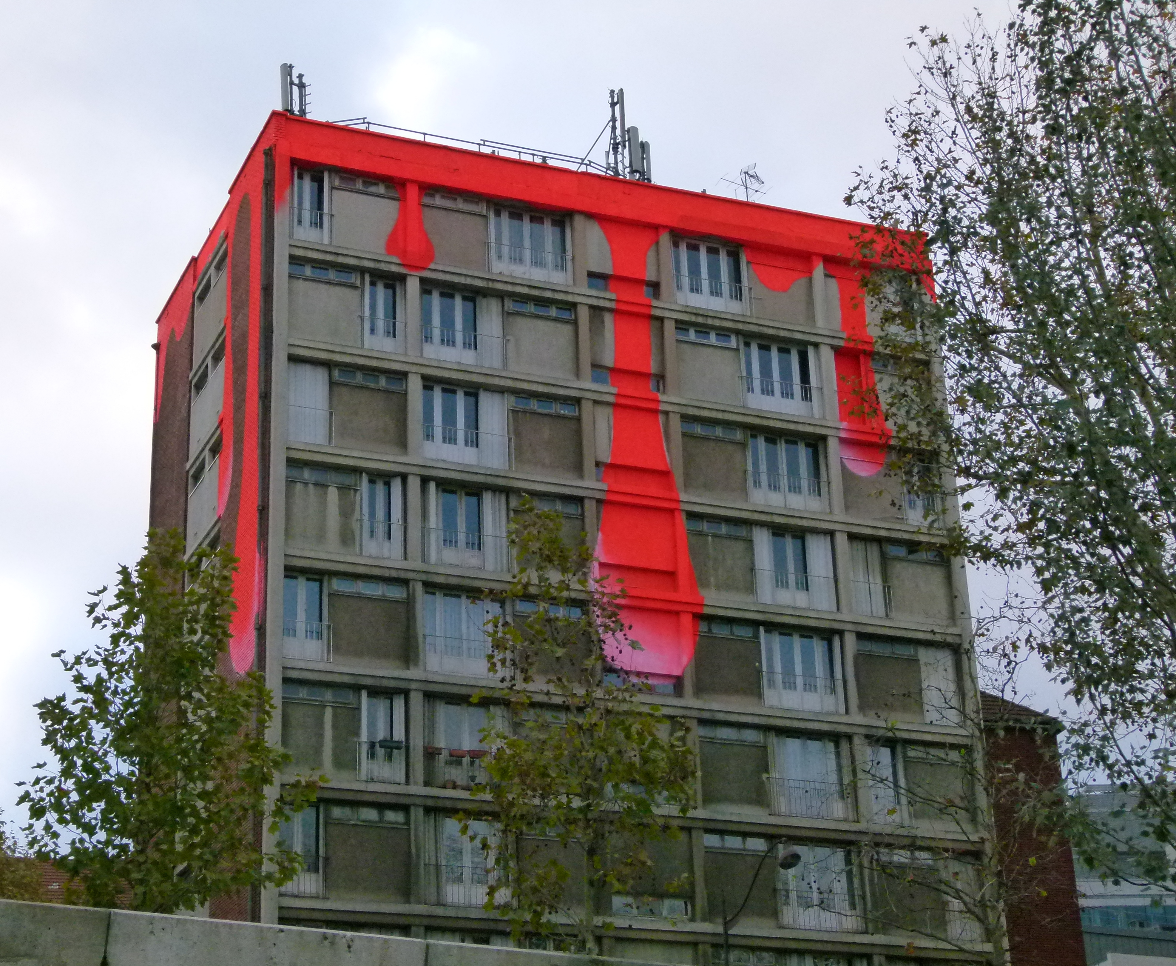 Immeuble peint par Idem, 5 rue Fulton, Paris.